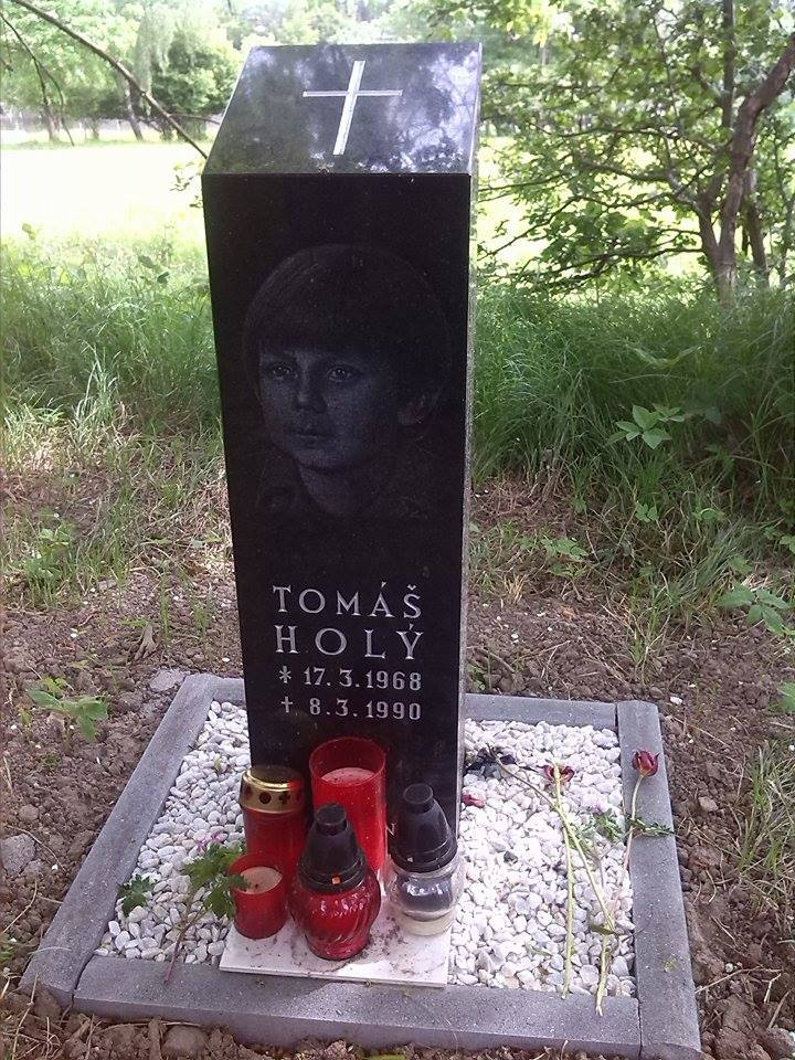 Tomáš Holý pomníček na místě nehody instalováno 11.05.2015